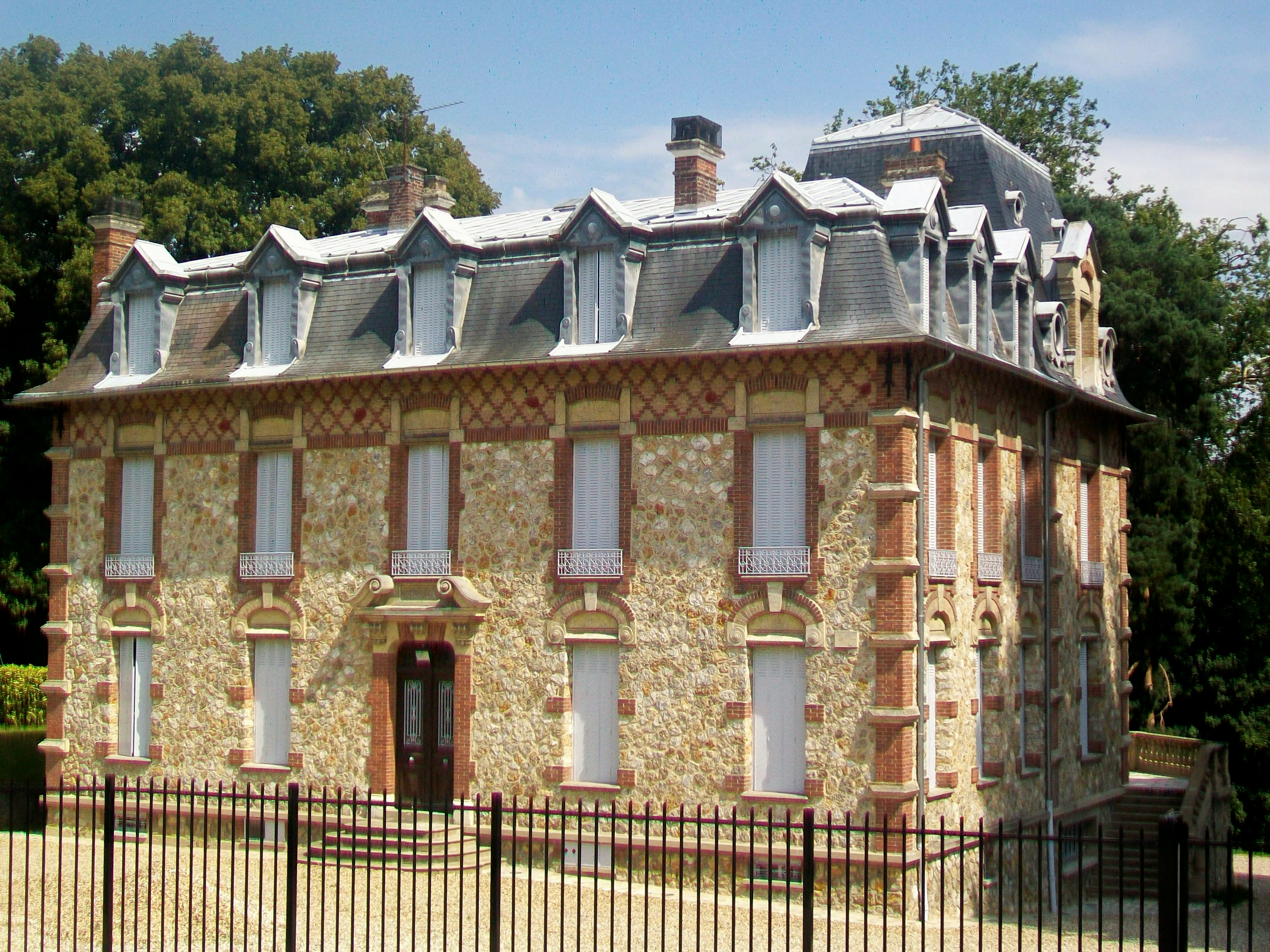 Le château, façade ouest.